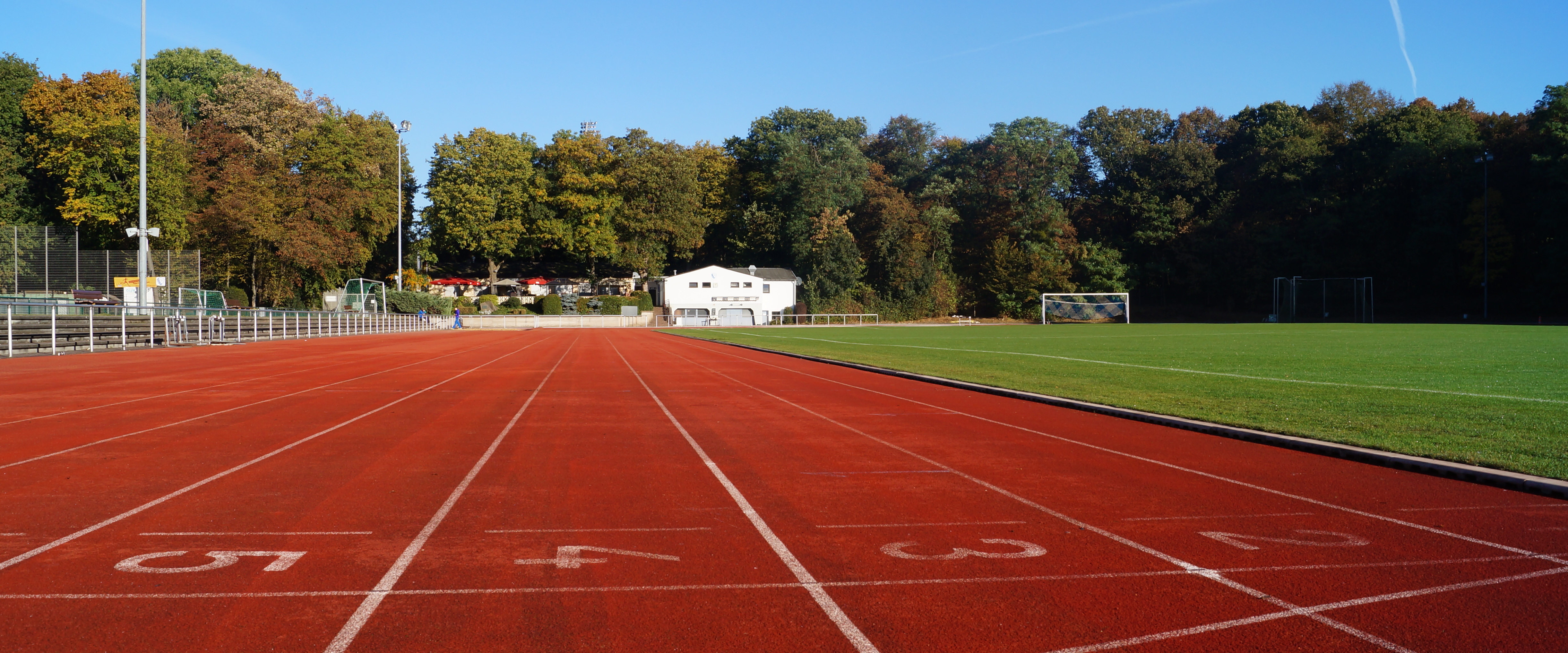 Sportanlage des Turn- und Sportvereins Köln rrh. 1874 e.V.